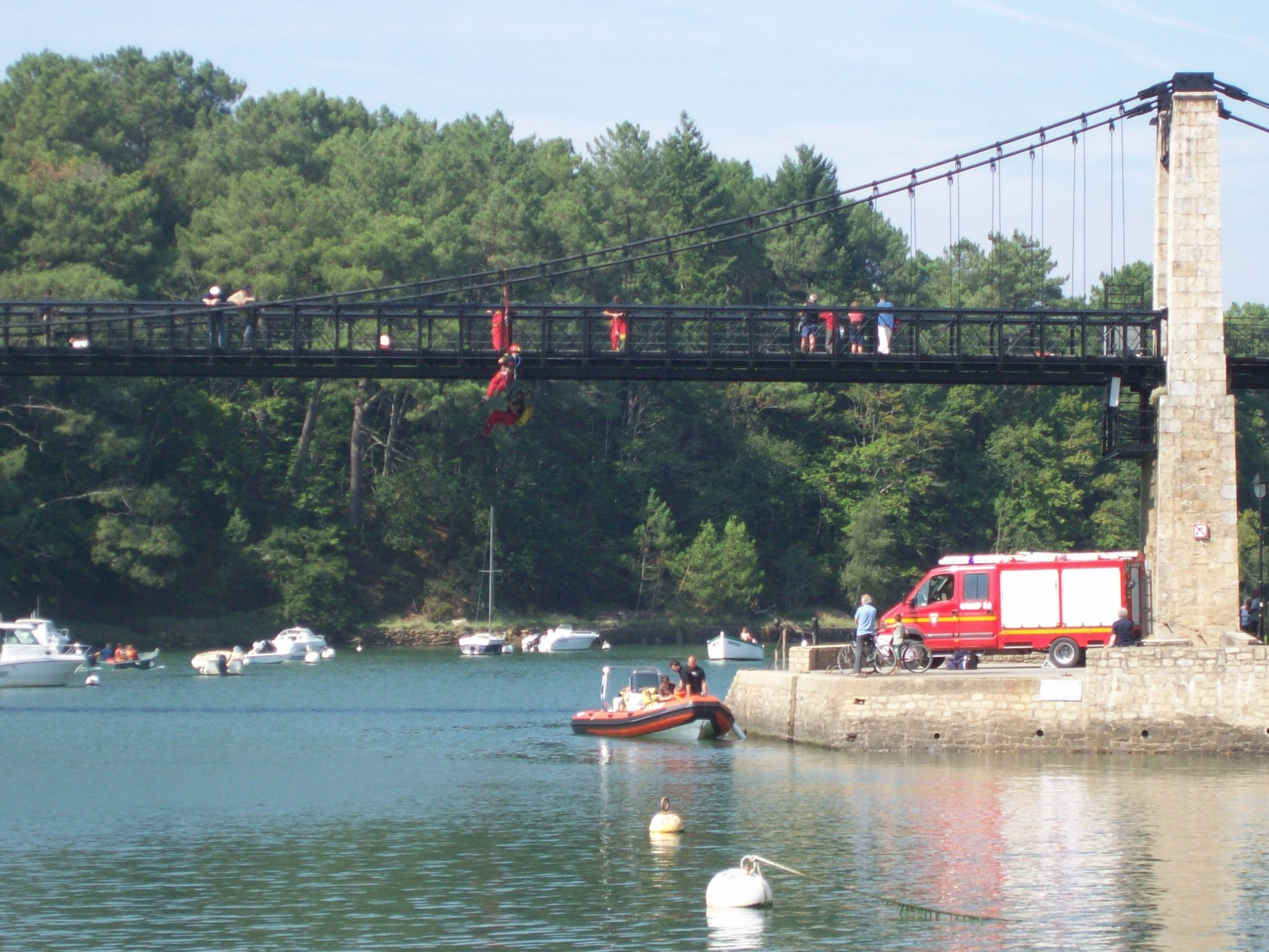 Entrainement de pompiers sur le vieux pont du Bono